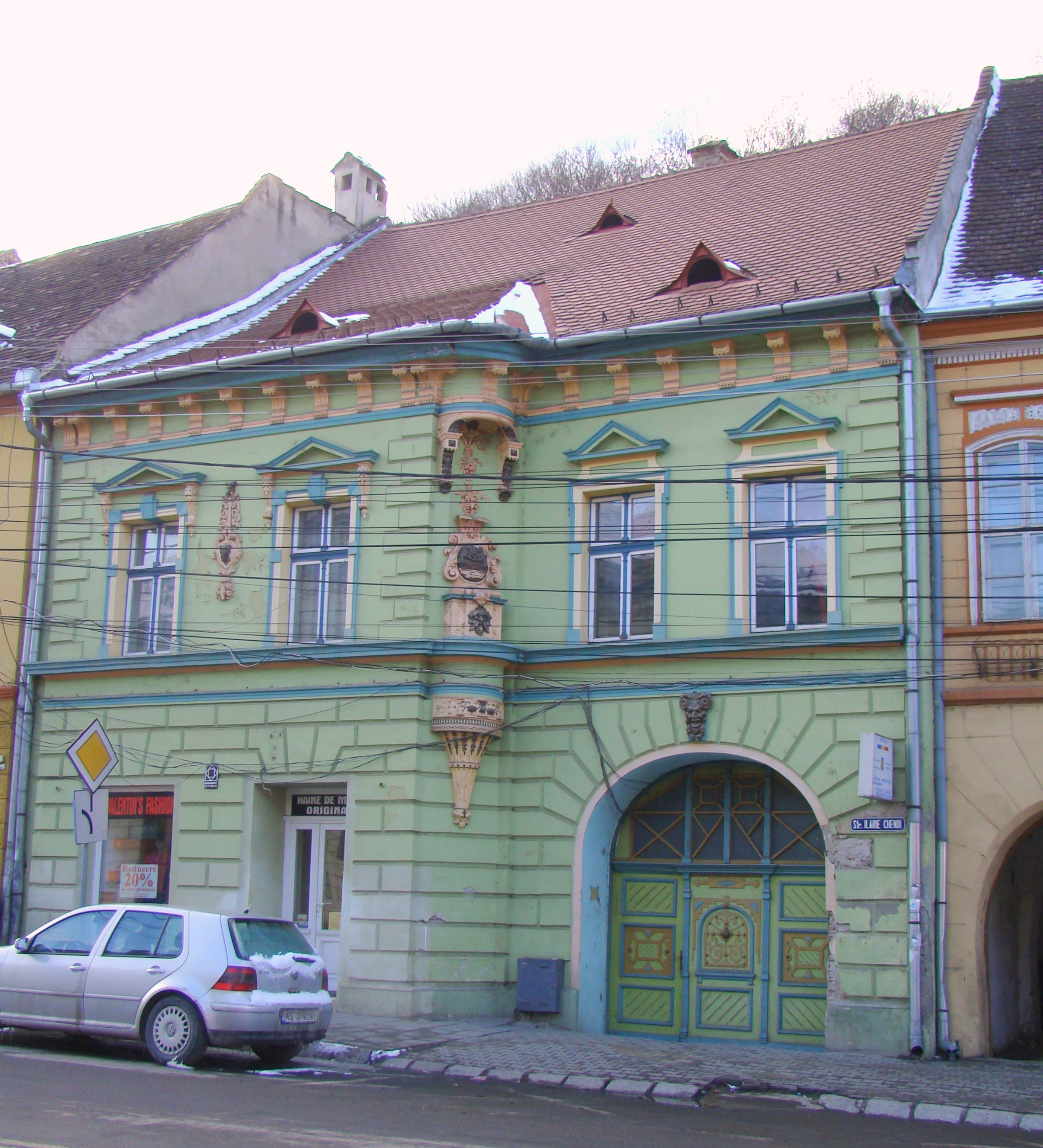 Casa Nistor, municipiul Sighișoara, str. Chendi Ilarie 2 sec. XIX